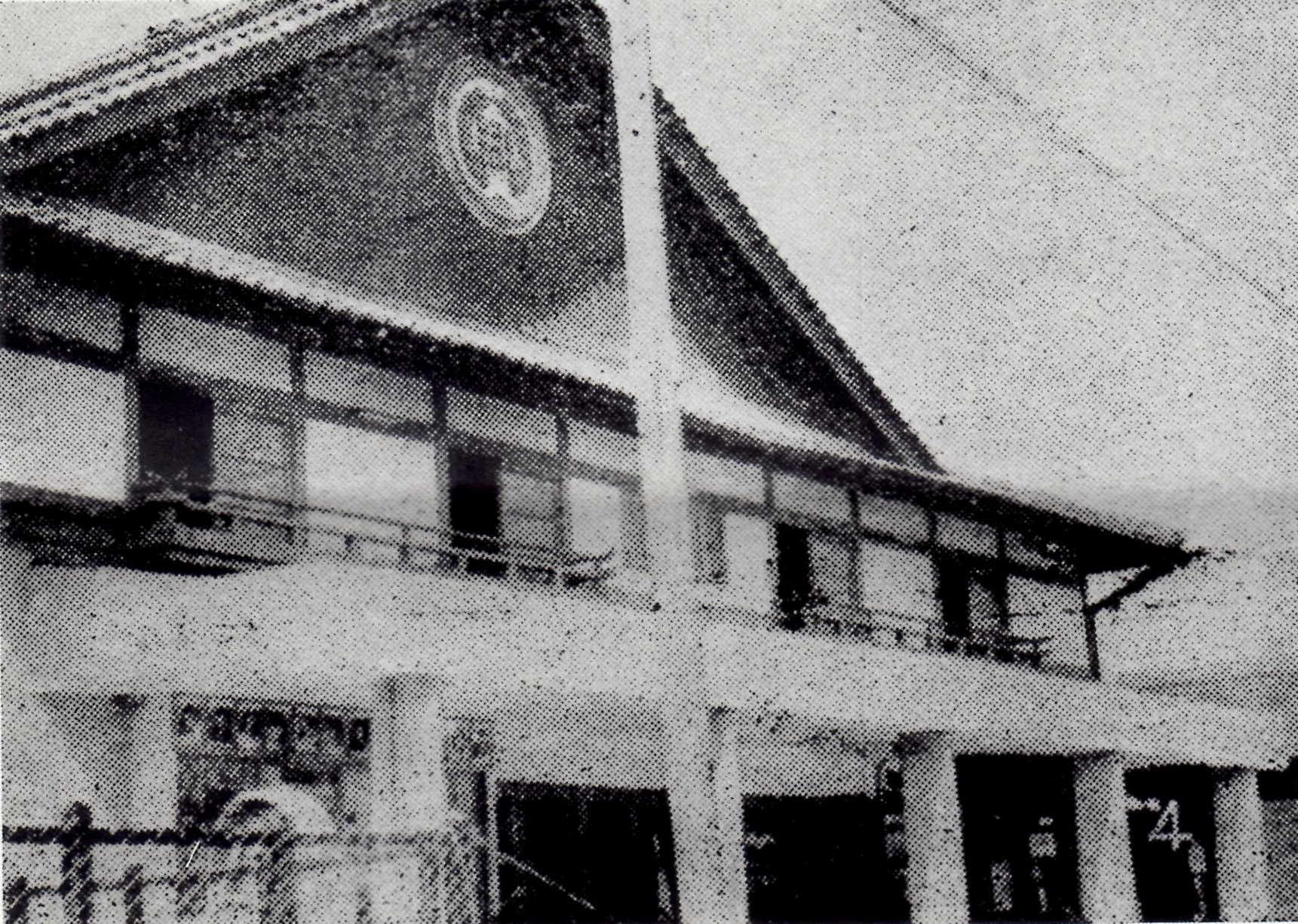 東雲座の後継館である映画館「知立劇場」。愛知県碧海郡知立町（現知立市）。